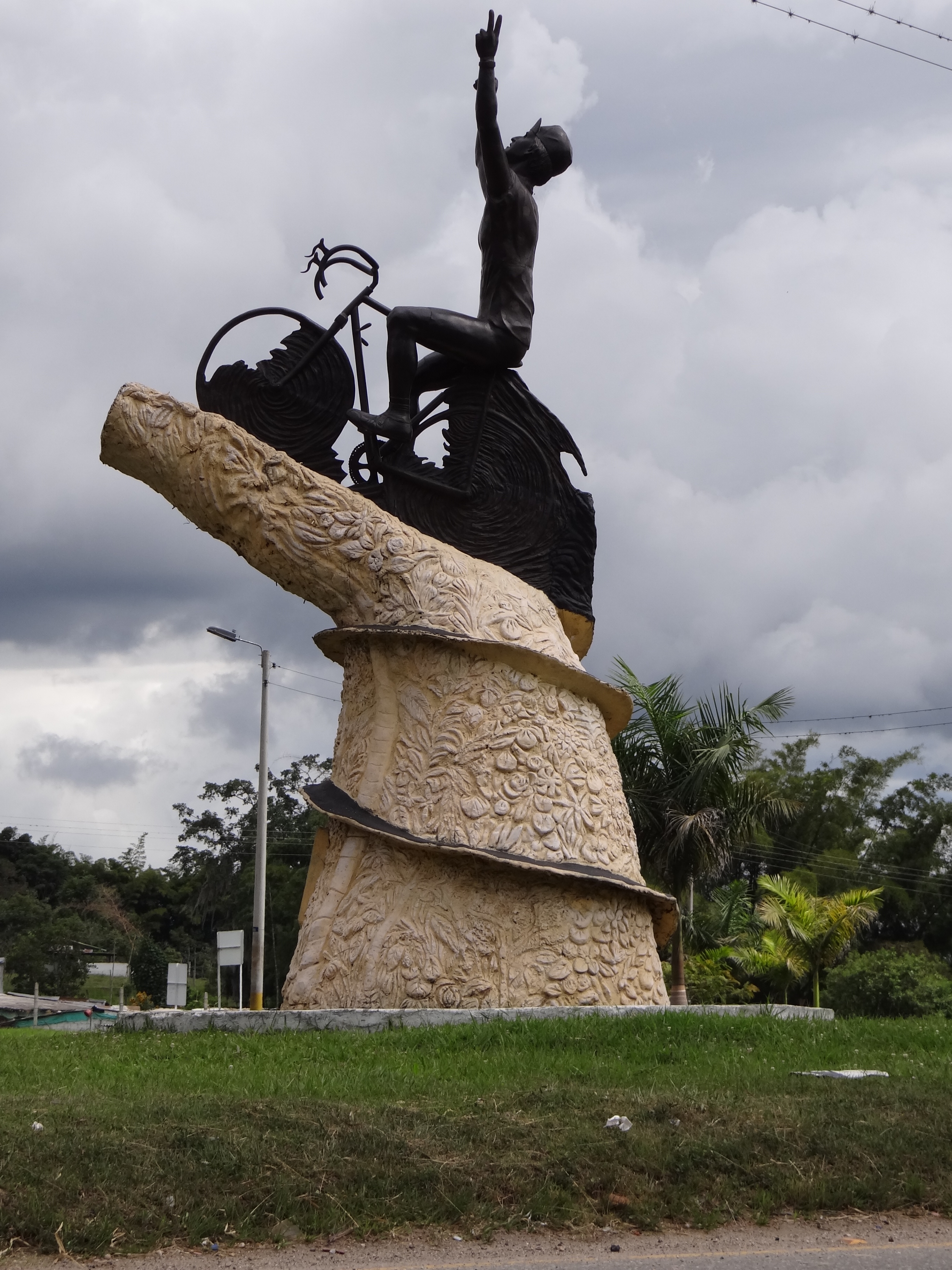 Estatua en homenaje a Luis Alberto Herrera, en Fusagasugá, departamento de Cundinamarca, Colombia.